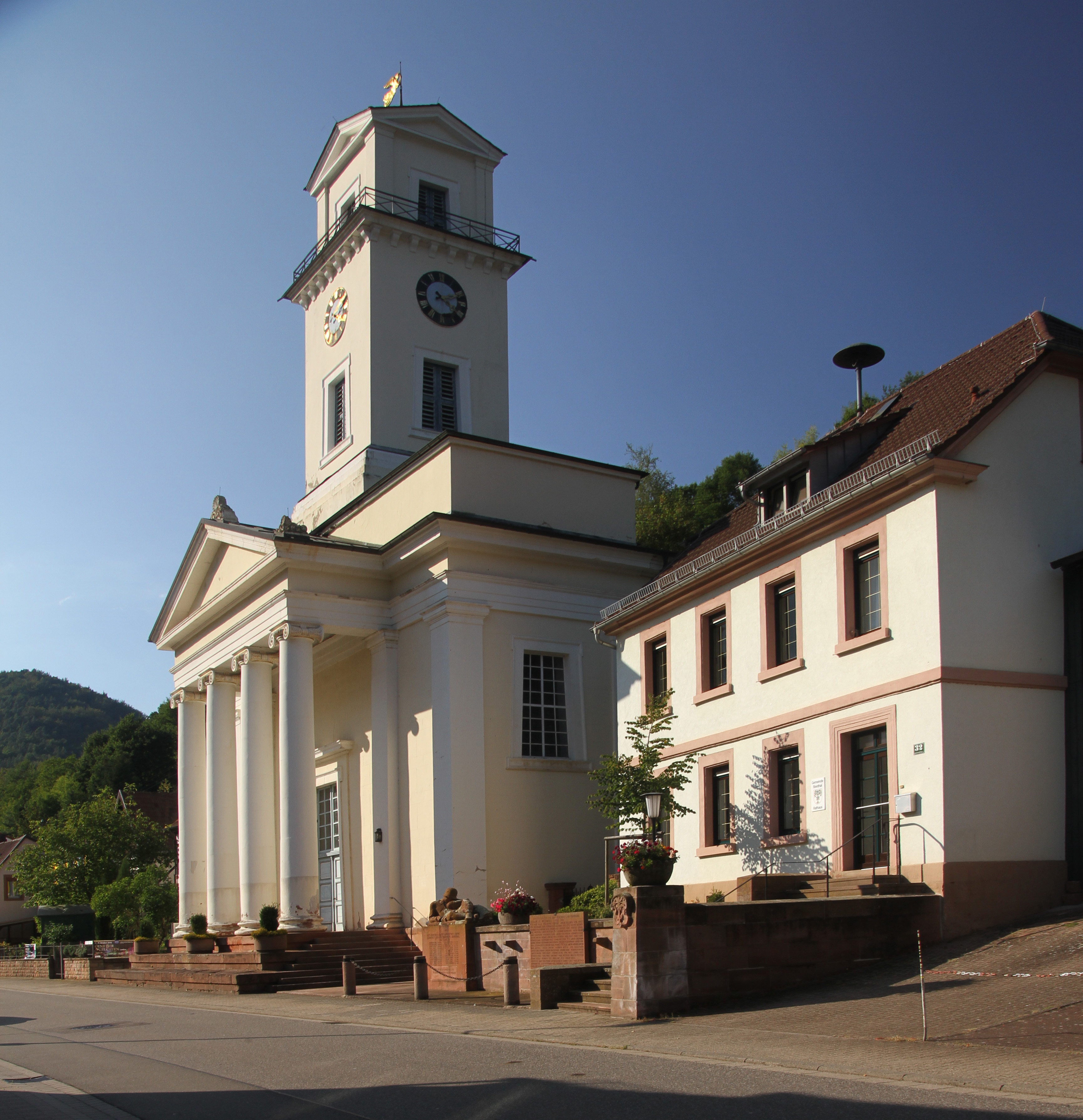 Evangelische Kirche Rinnthal, Hauptstrasse 34